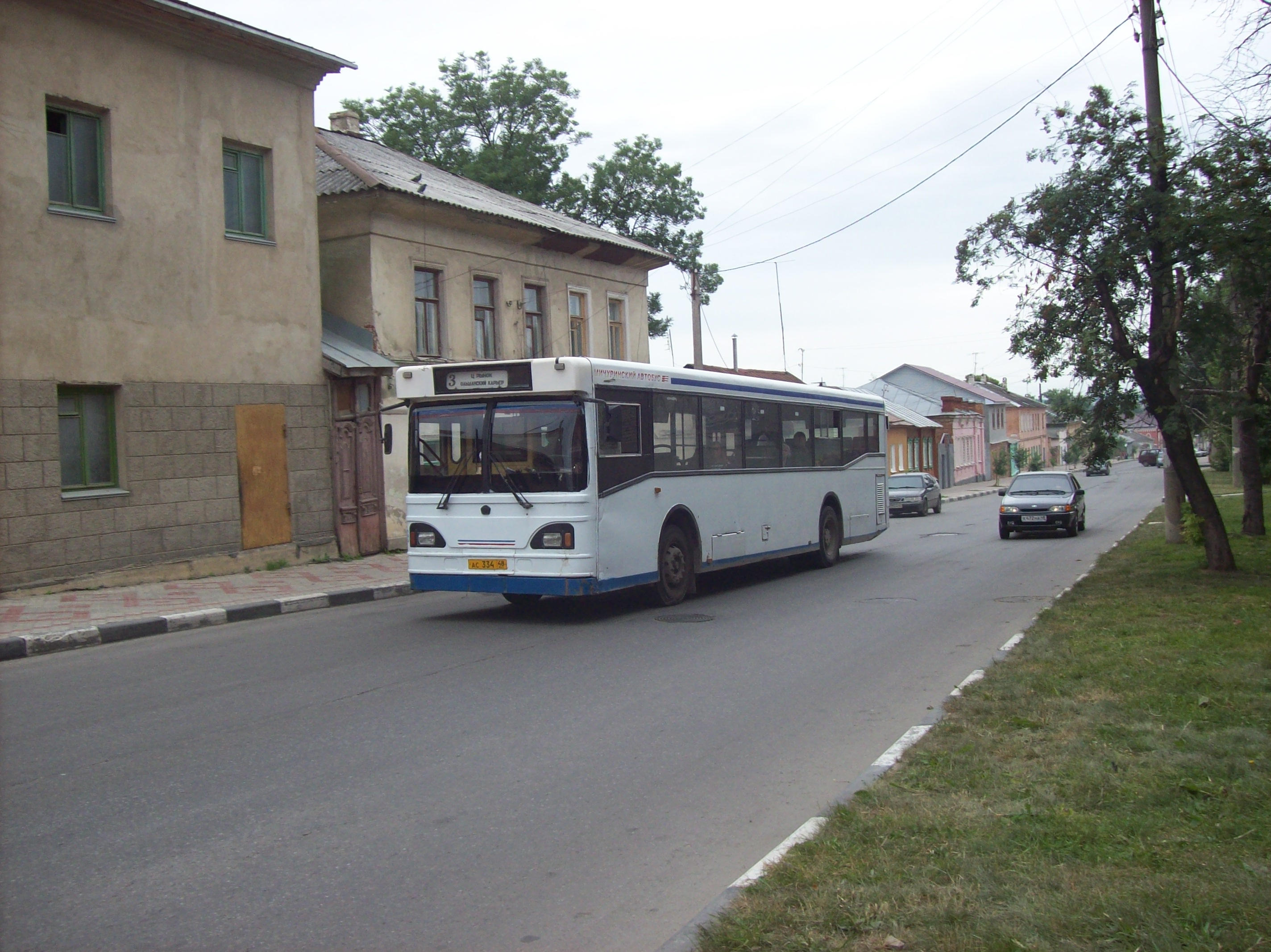 Автобус МАРЗ на маршруте N3 в Ельце